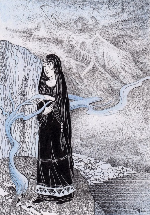 Feiticeira nórdica